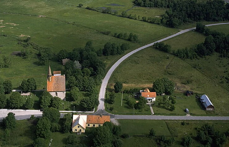 Motiv: Västergarns kyrka Nyckelord: Flygbilder, Riksintressen Kategori: KyrkomiljöVästergarns kyrka